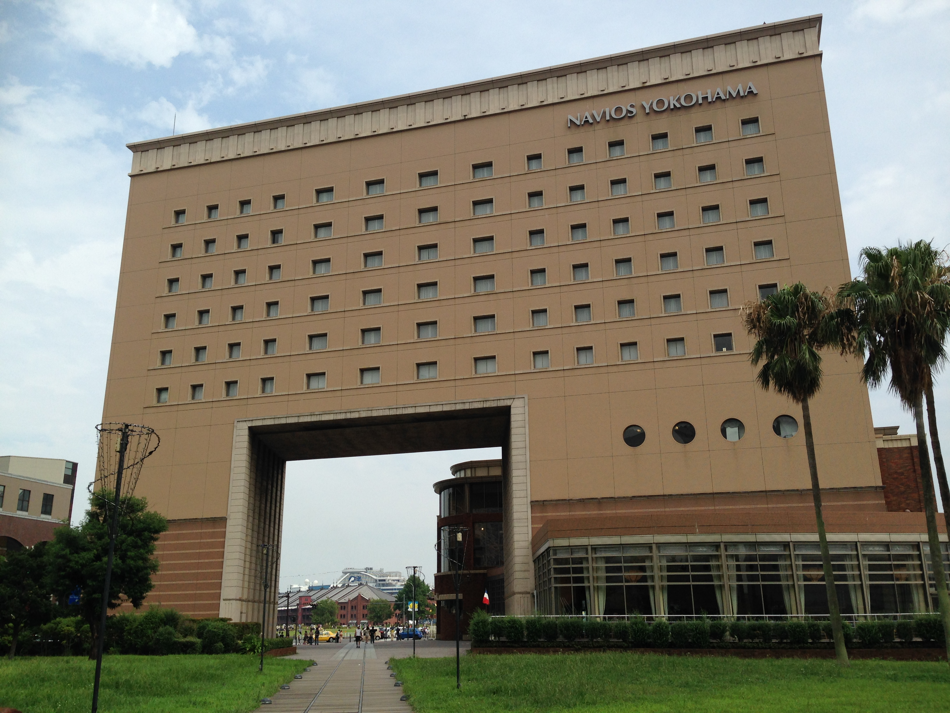 ナビオス横浜（横浜国際船員センター）の外観。運河パーク方面より。